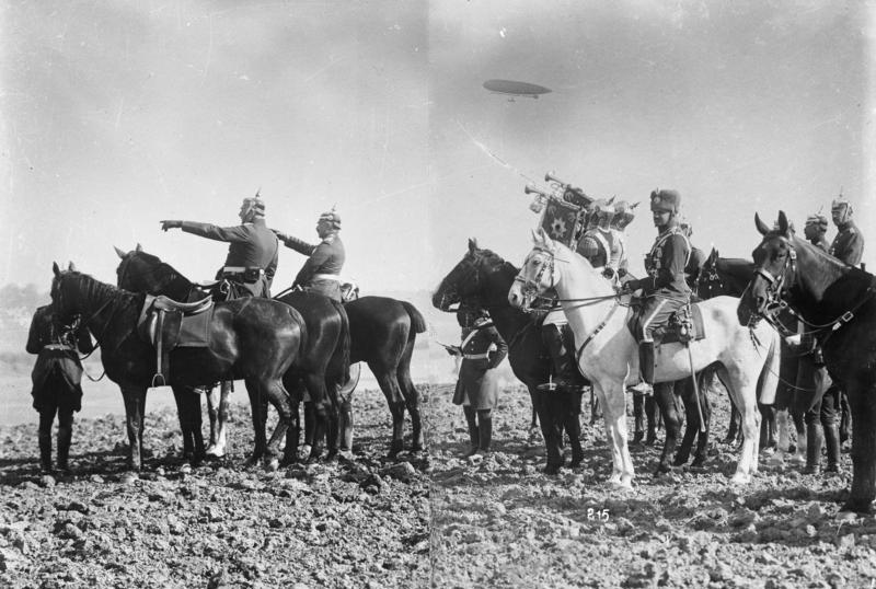 Kaisermanöver 1911 in Mecklenburg (Uckermark) "Das Ganze halt"